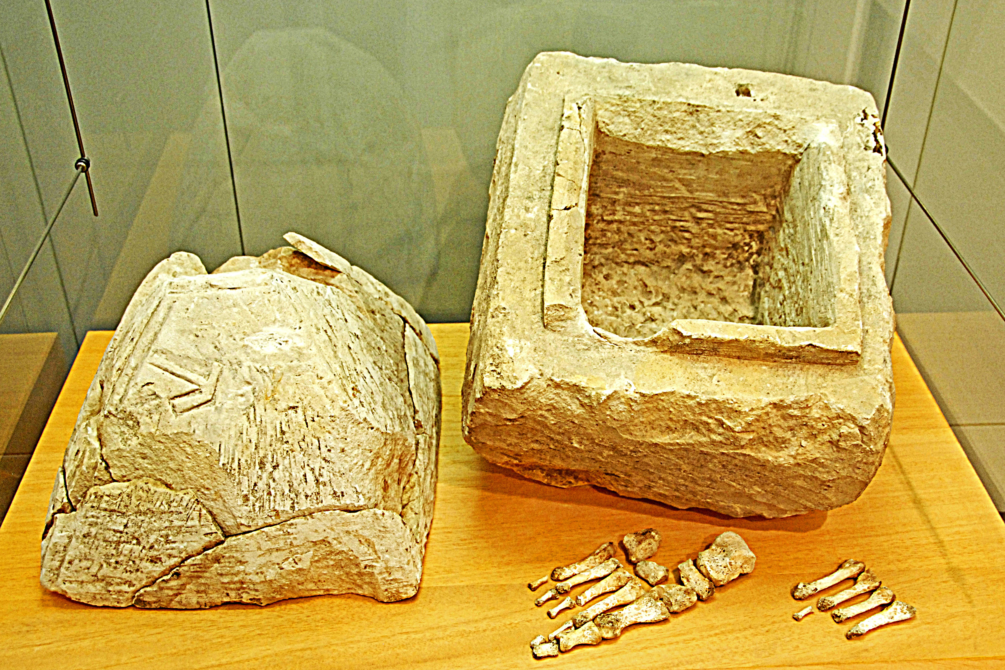 Civaux, Museum, galloröm. Kalksteinhülle für Glasurne, davor Reste des os resectum